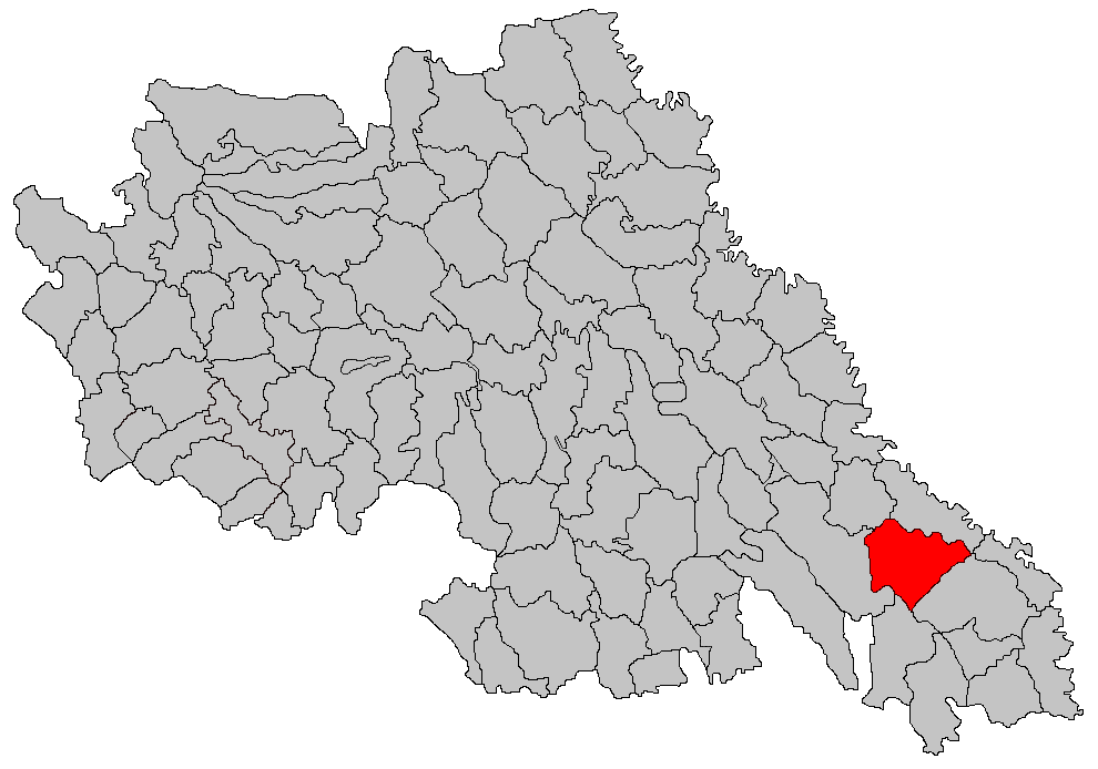 Categorie:Hărţi ale judeţului Iaşi